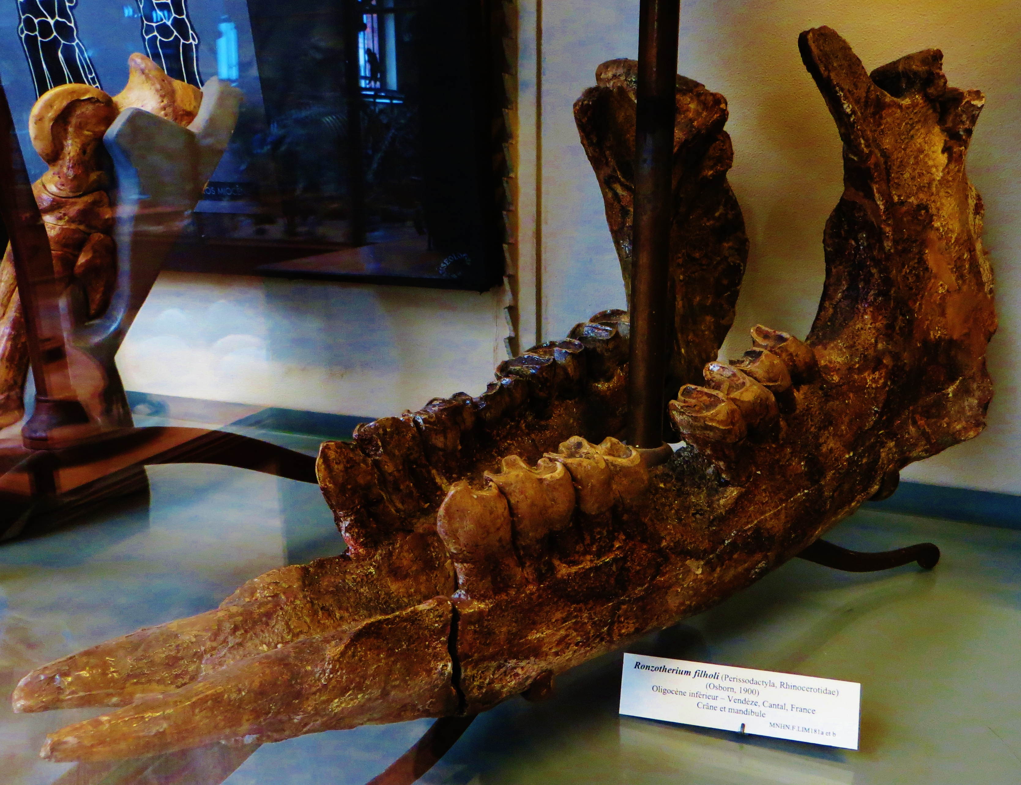 Fossil of Ronzotherium, an extinct mammal - Took the photo at Musee d'Histoire Naturelle, Paris